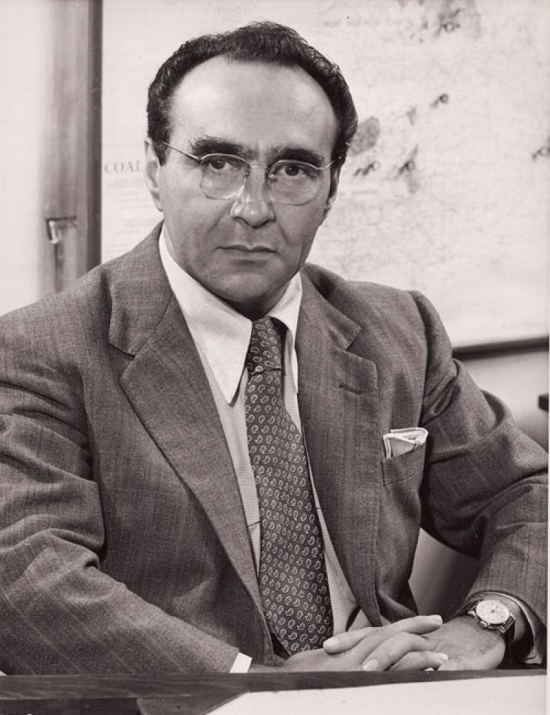 Matematico, biologo, storico